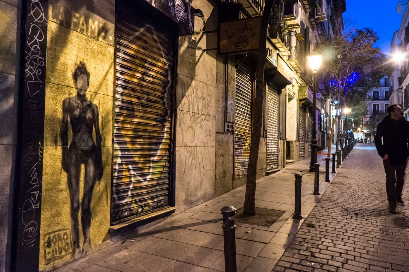 Calle Velarde 8, Madrid, España.